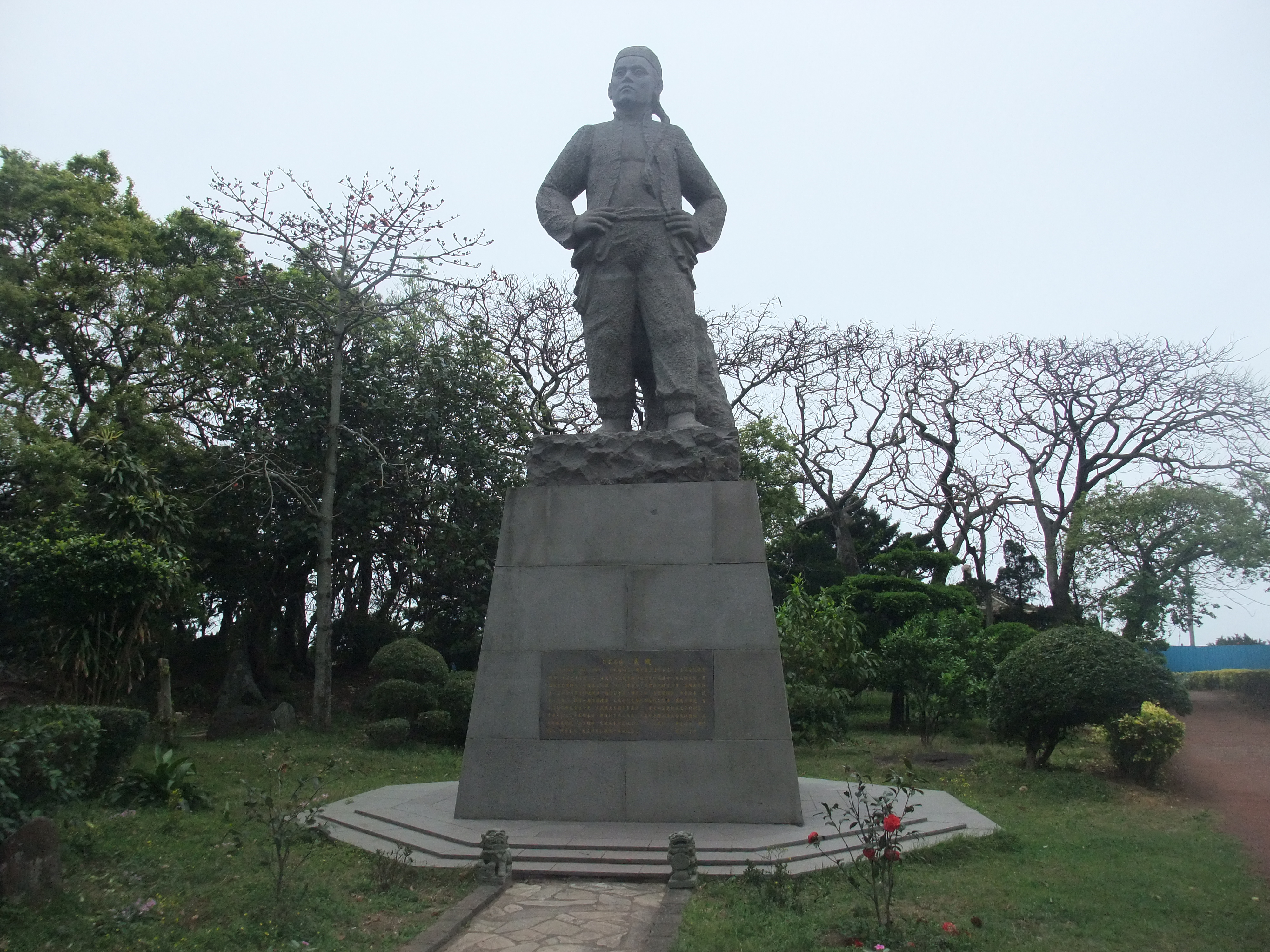 中文（台灣）: 廖添丁廟銅像。